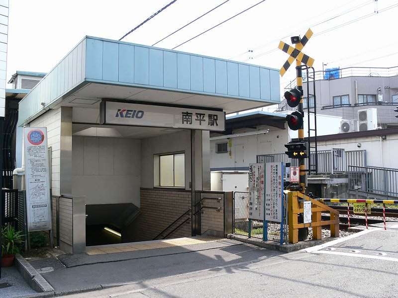 Keio railway Minamidaira stationja:南平駅.